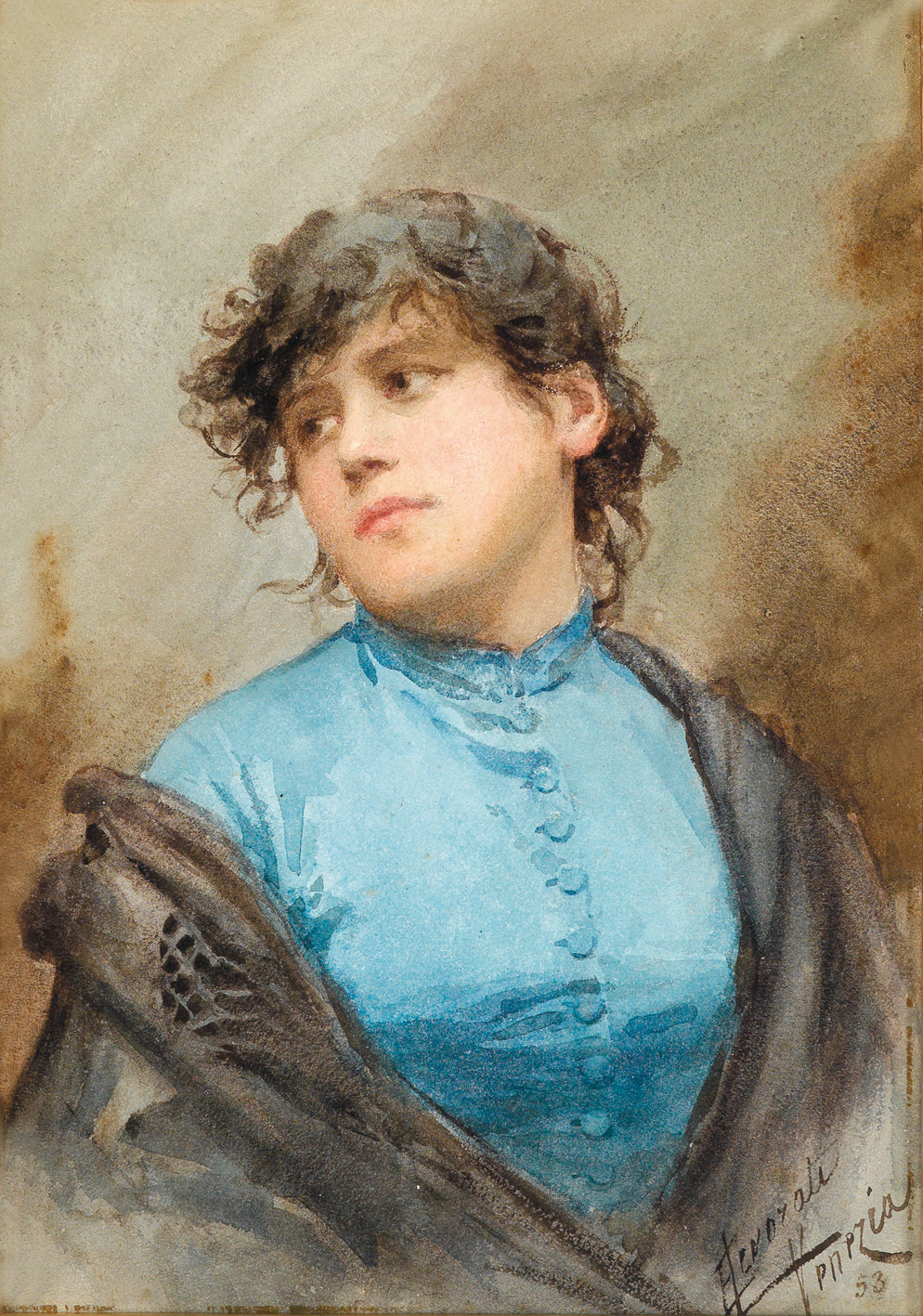 Bildnis einer jungen Frau in blauem Kleid.